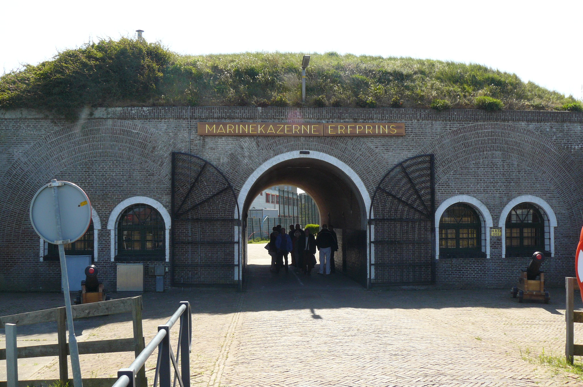 Deze toegangspoort ligt bij het grote parkeerterrein aan de kant van Den Helder. De Helderse Poort is in 1835 gebouwd. In dit gebouw zat de wacht, nu is er een klein museum.